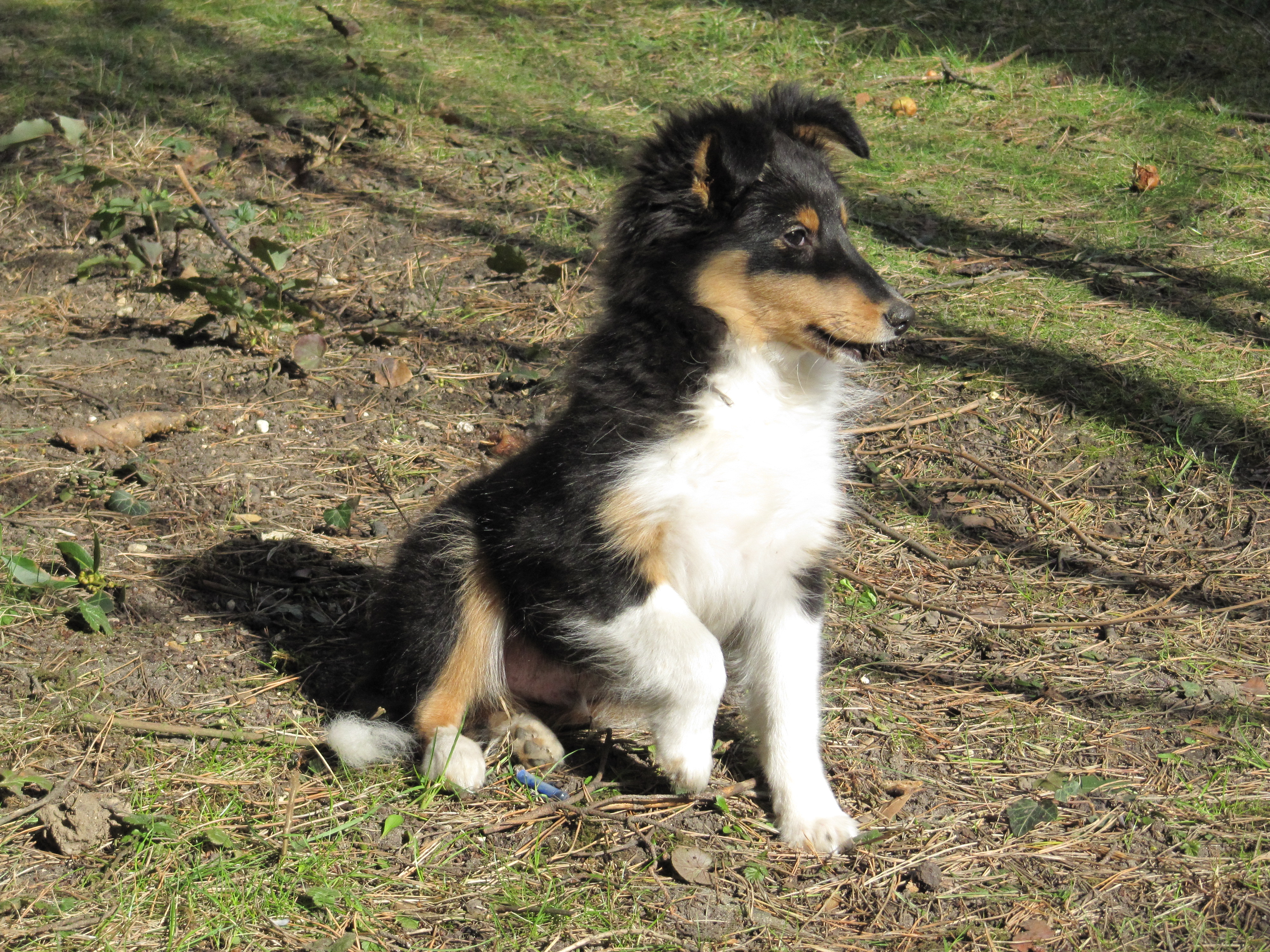 chiot berger des shetlands